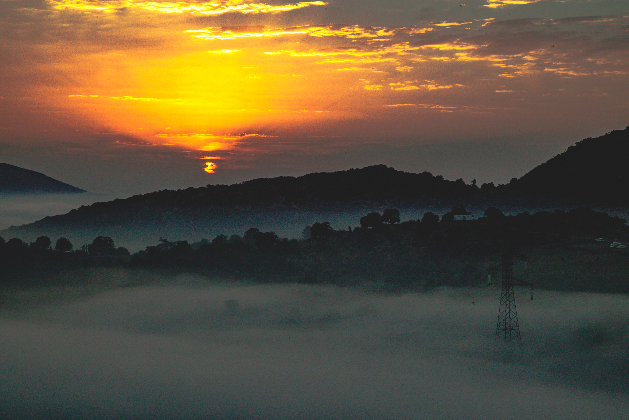 این عکس توسط پوریا افخمی ثبت شده است.